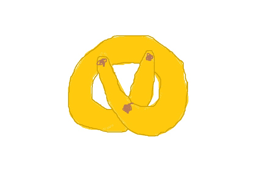 Exempel på hur en gastkringla förr i tiden såg ut.